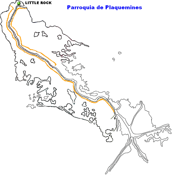 Little Rock, Louisiana.